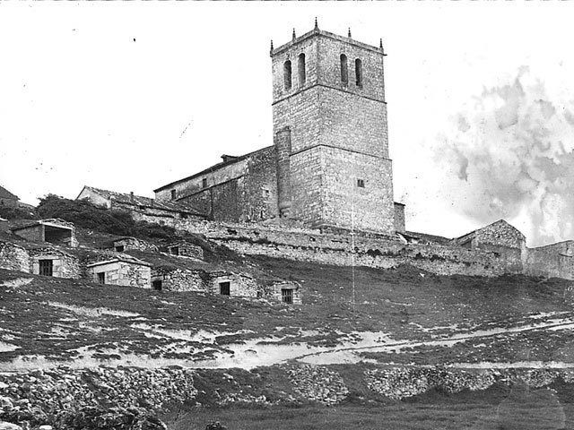 Iglesia parroquial de Nuestra Señora de la Asunción - Canalejas de Peñafiel (Valladolid) - Iglesia parroquial dedicada a Nuestra Señora de la Asunción. A la izquierda pueden observarse los accesos a innumerables bodegas. Es una construcción gótica que se superpuso a una románica, y así en la portada de ingreso podemos ver dos archivoltas ligeramente apuntadas que se fechan a finales del siglo XII. Consta de dos naves y un coro alto del siglo XVI sostenido por una bóveda plana de nervios combados. Este tramo lleva bóveda gótica del XV, la nave se cubre con bóvedas de arista decoradas con yeserías barrocas y la capilla mayor con bóveda de crucería estrellada del XVI. El retablo mayor, barroco de finales del siglo XVII, está presidido por la Virgen de la Asunción. - Fotografía. Papel 118 x 87 B/N